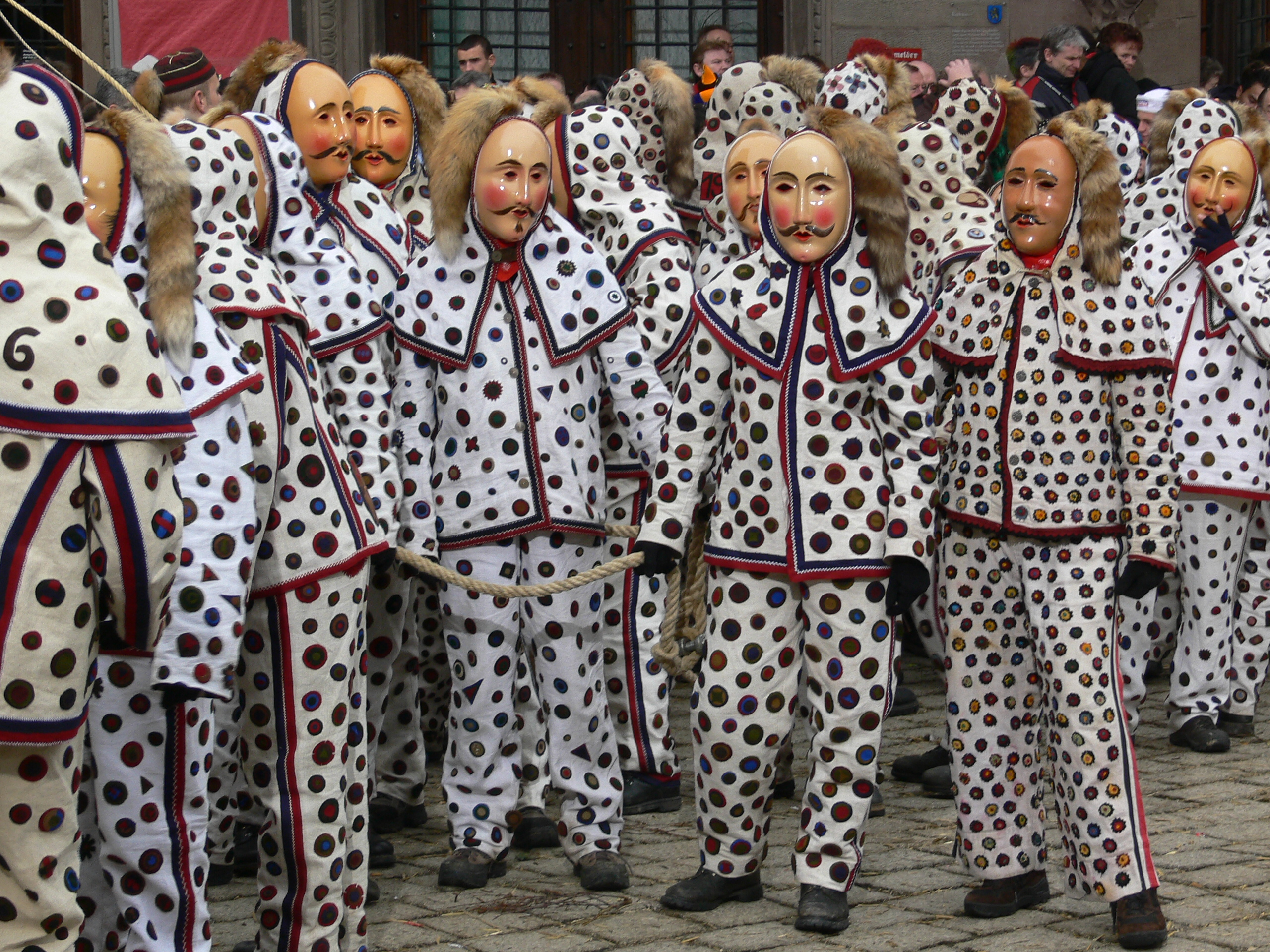 Narrenzunft Fridingen Veranstaltung: Narrensprung beim Narrentreffen Meßkirch 2006